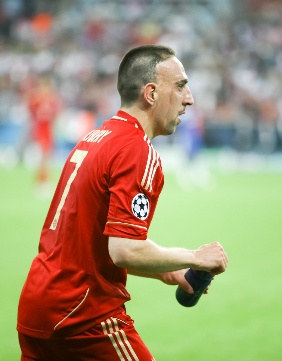 RA1_6170